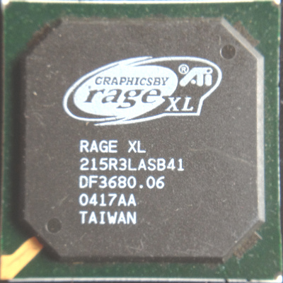 RAGE XL